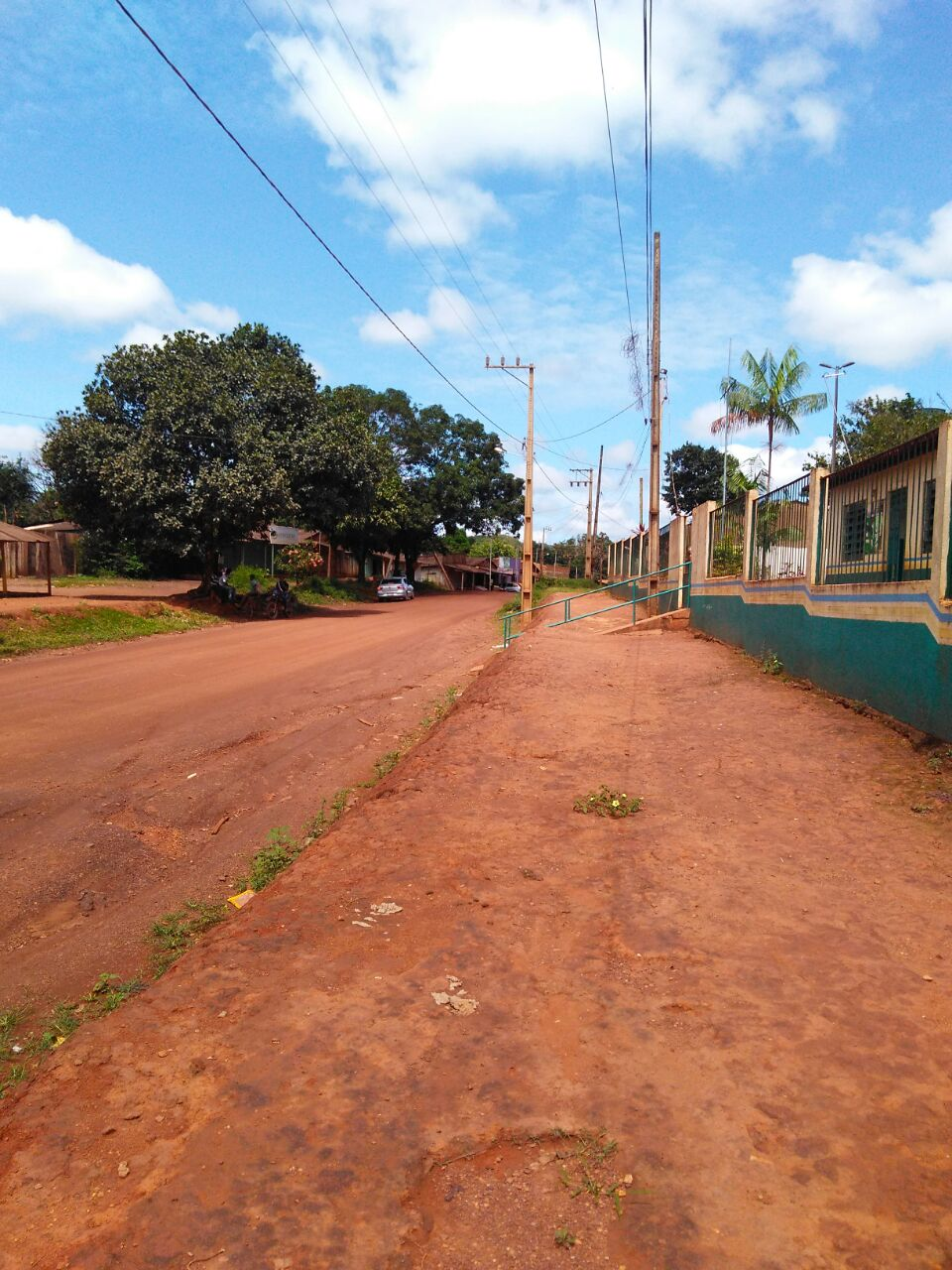 Avenida Nova República, sentido cava do garimpo, no bairro Centro do distrito de Serra Pelada